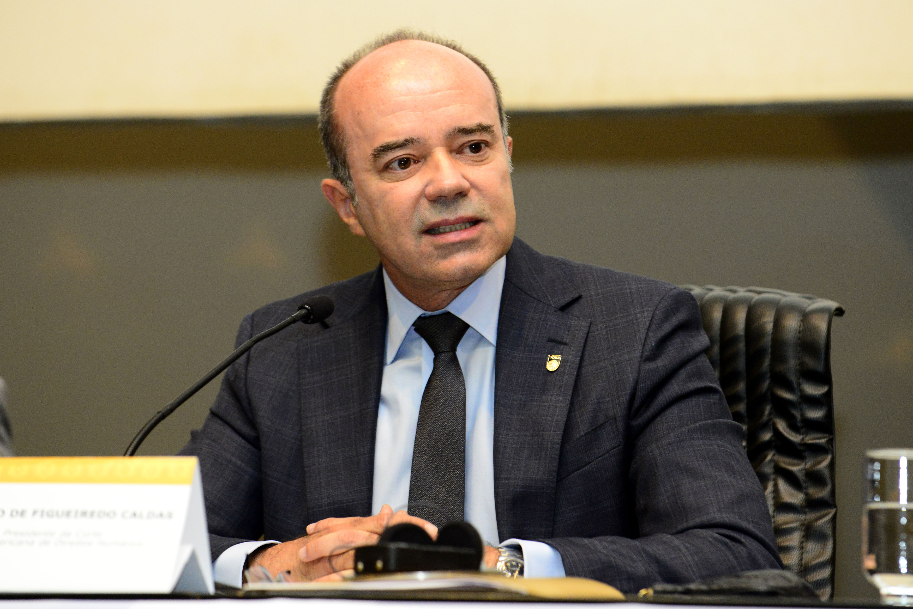 Roberto de Figueiredo Caldas Corte Interamericana de Derechos Humanos